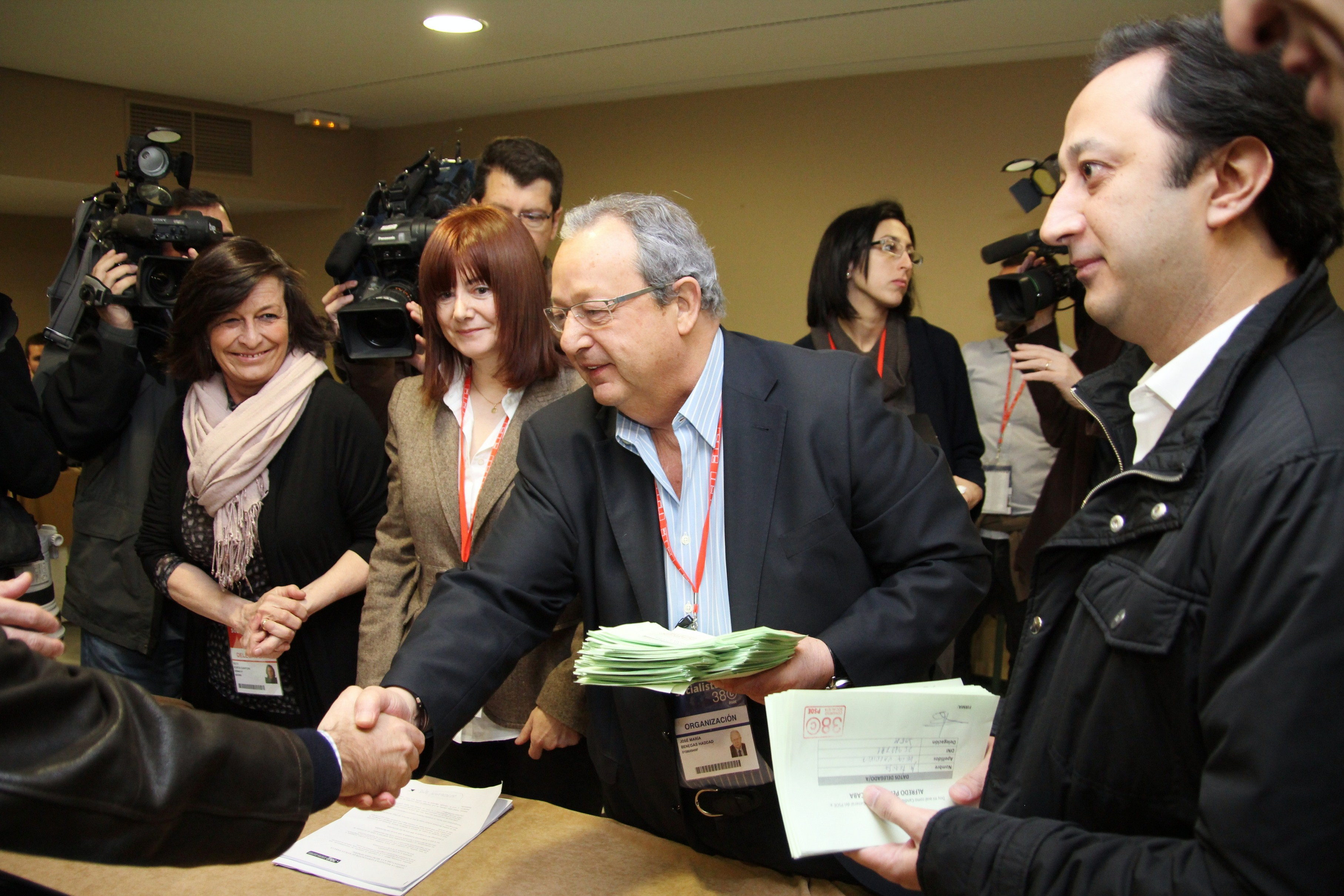 Txiki Benegas entrega los avales necesarios para que Alfredo Pérez Rubalcaba sea candidato a la secretaría general del PSOE en el 38 Congreso del partido